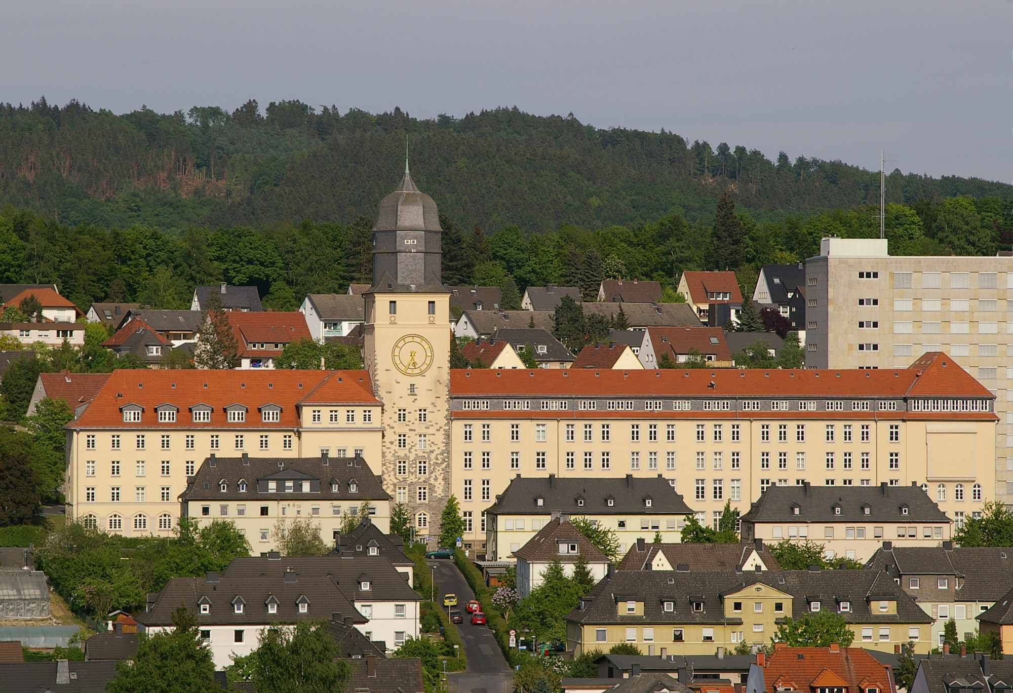 Bezirksregierung Arnsberg, Dienstgebäude Seibertzstraße 1, Arnsberg, Nordrhein-Westfalen